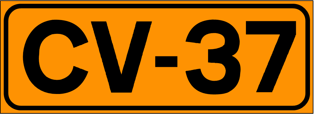 Inidcador de la Carretera de la Comunidad Valenciana CV-37